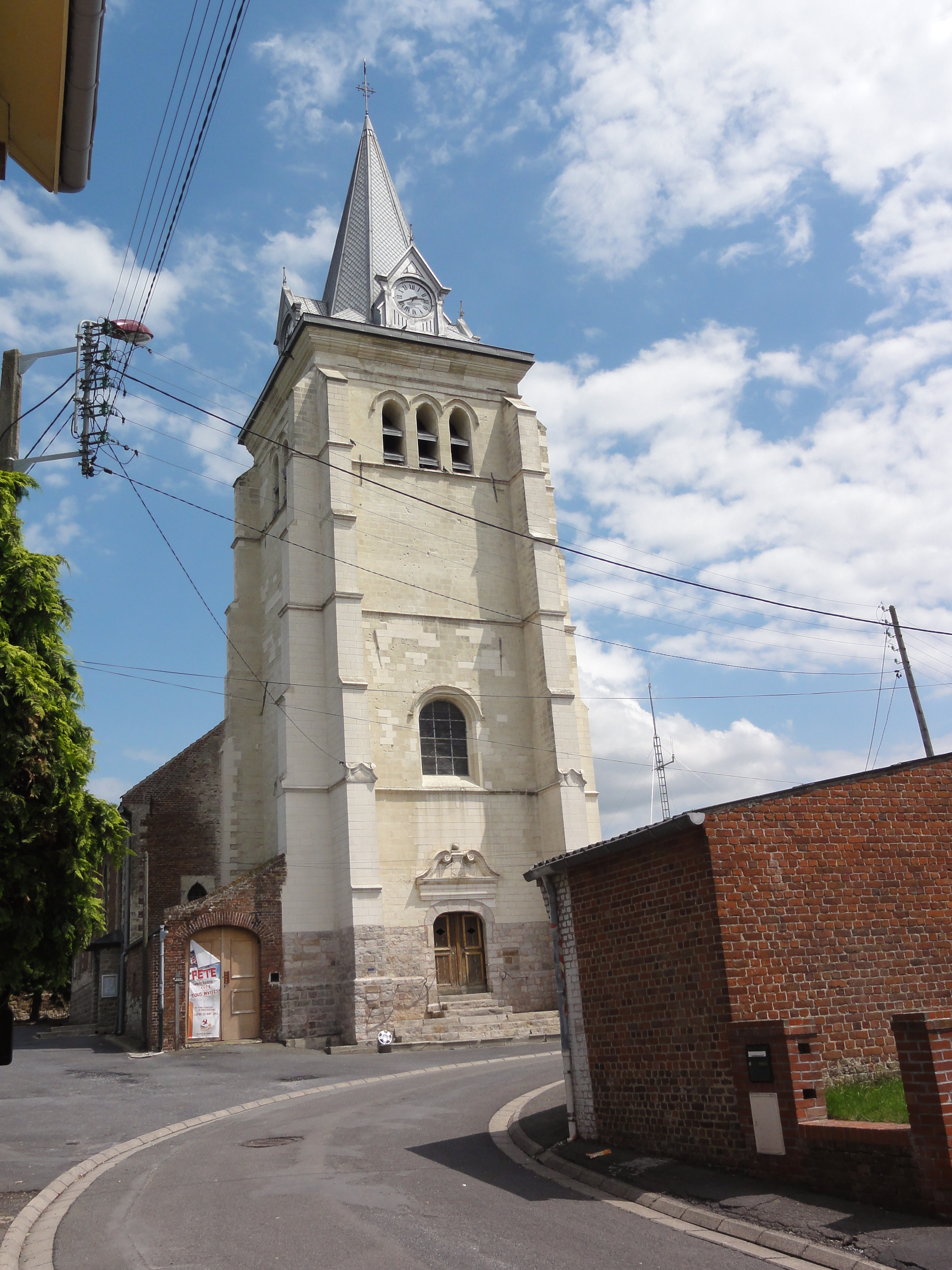 Saulzoir (Nord, Fr) église, façade (tour).